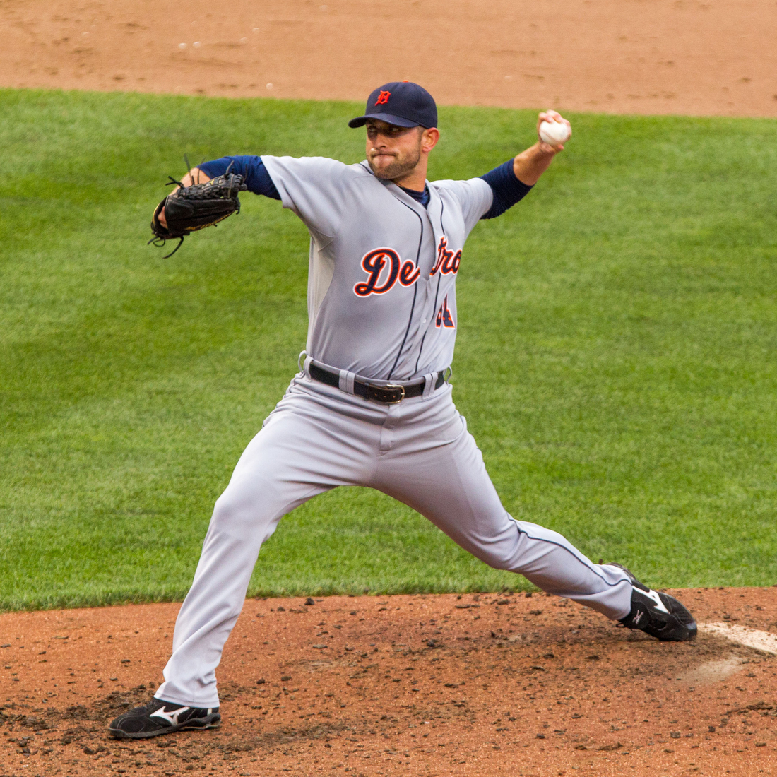 Duane Below